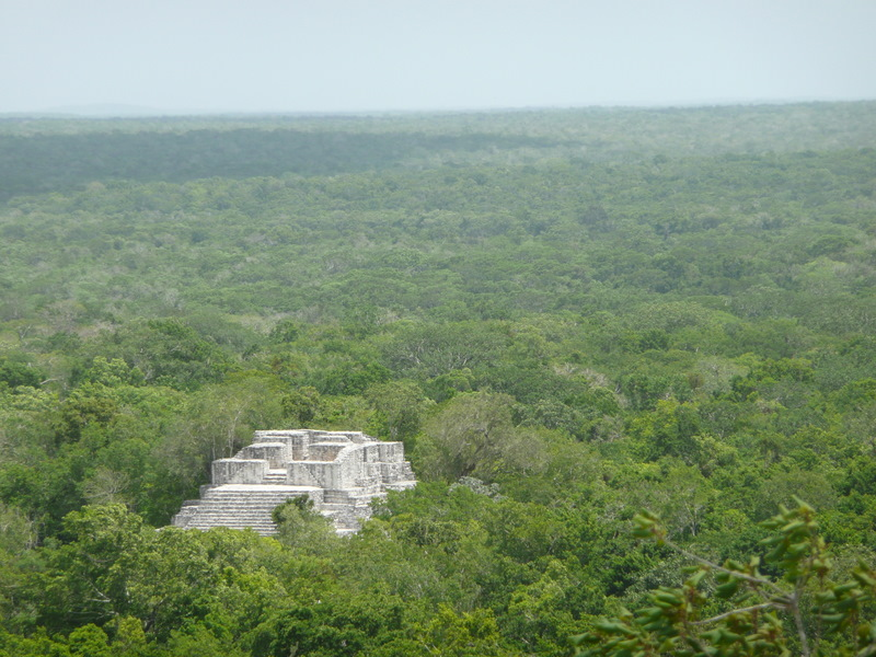 Zona arqueológica de Calakmul.